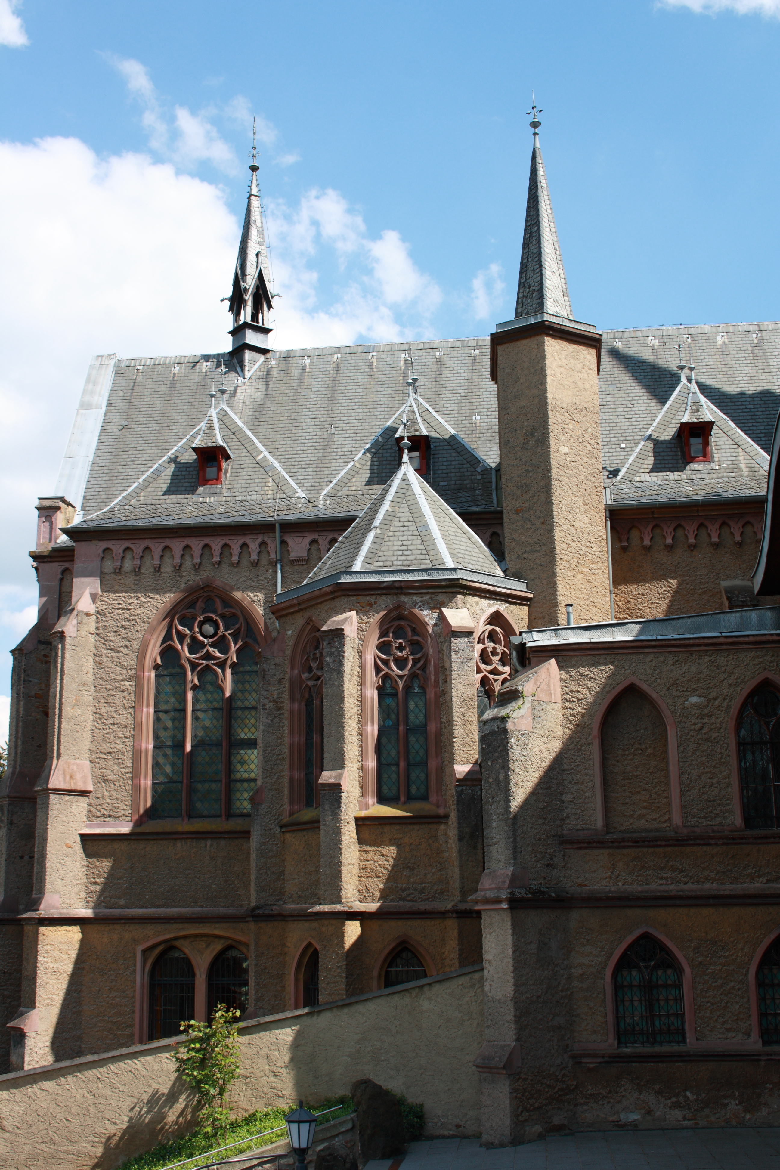 Kloster Kalvarienberg in Ahrweiler